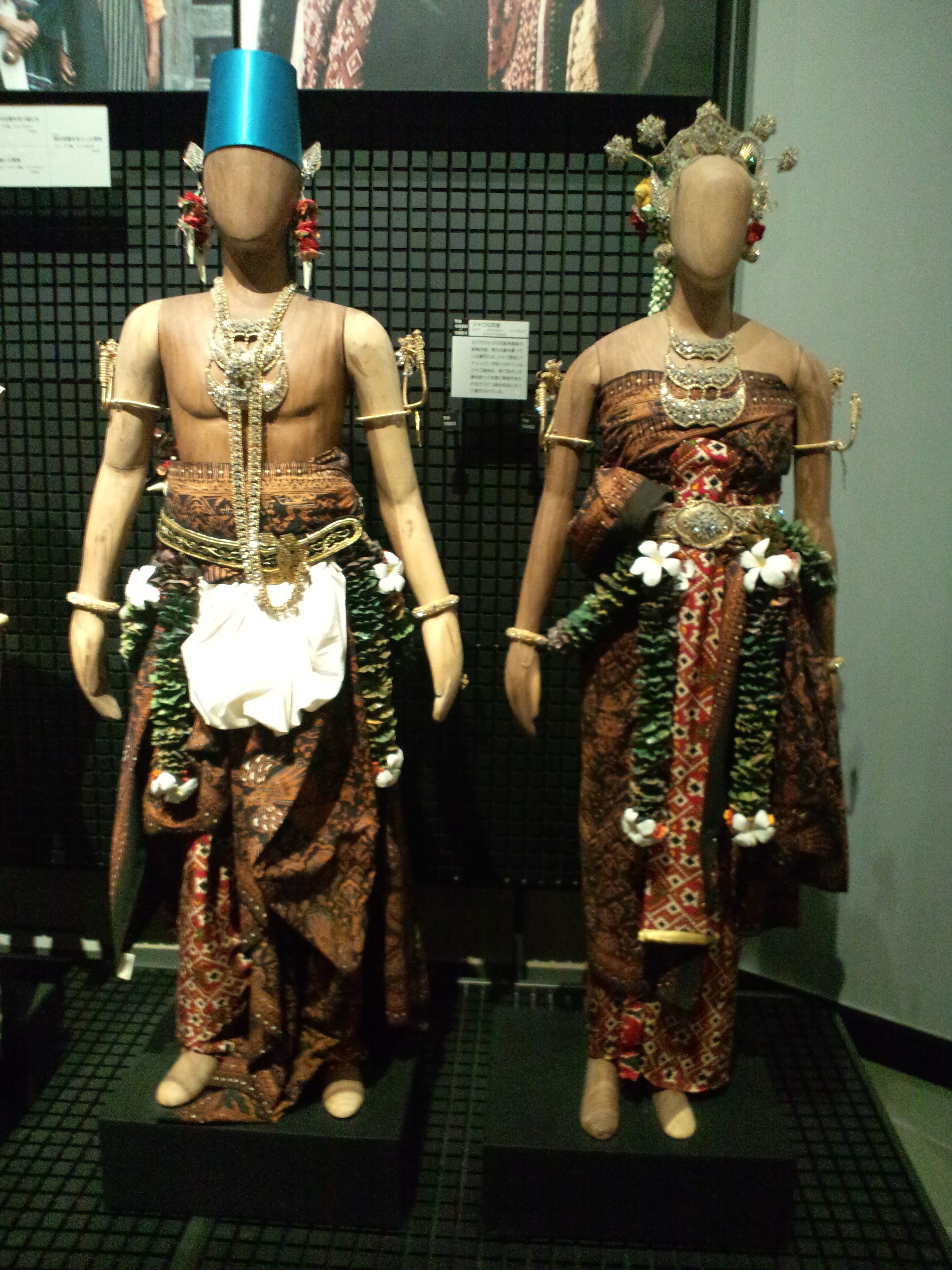 国立民族学博物館（大阪） ジャワの民族衣装（インドネシア、ヨグヤカルタ）